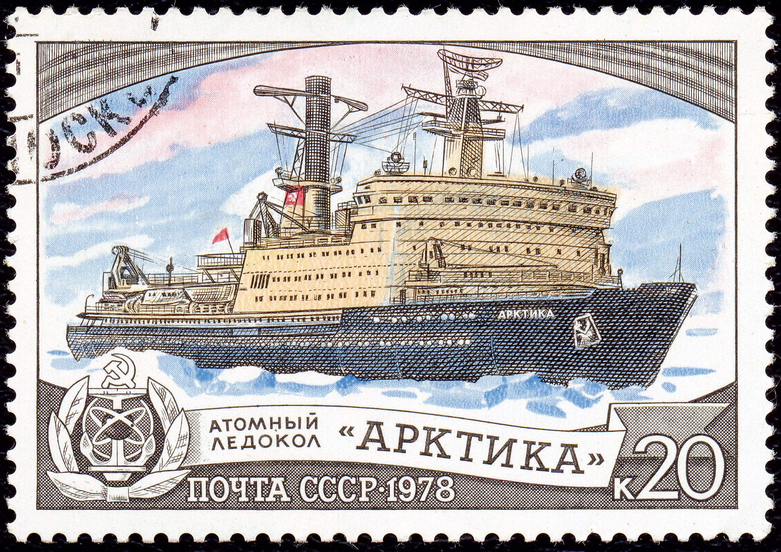 Почтовая марка СССР. 1978. Атомный ледокол Арктика